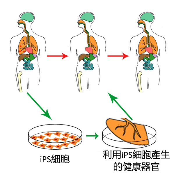 基於iPS細胞的細胞替代療法簡圖。先是使用病人的體細胞重編程爲iPS細胞，再用iPS細胞生成健康的器官，再通過移植手術將健康臟器移入患者體內。本圖翻譯自已釋入公有領域的File:Ips_cells.png